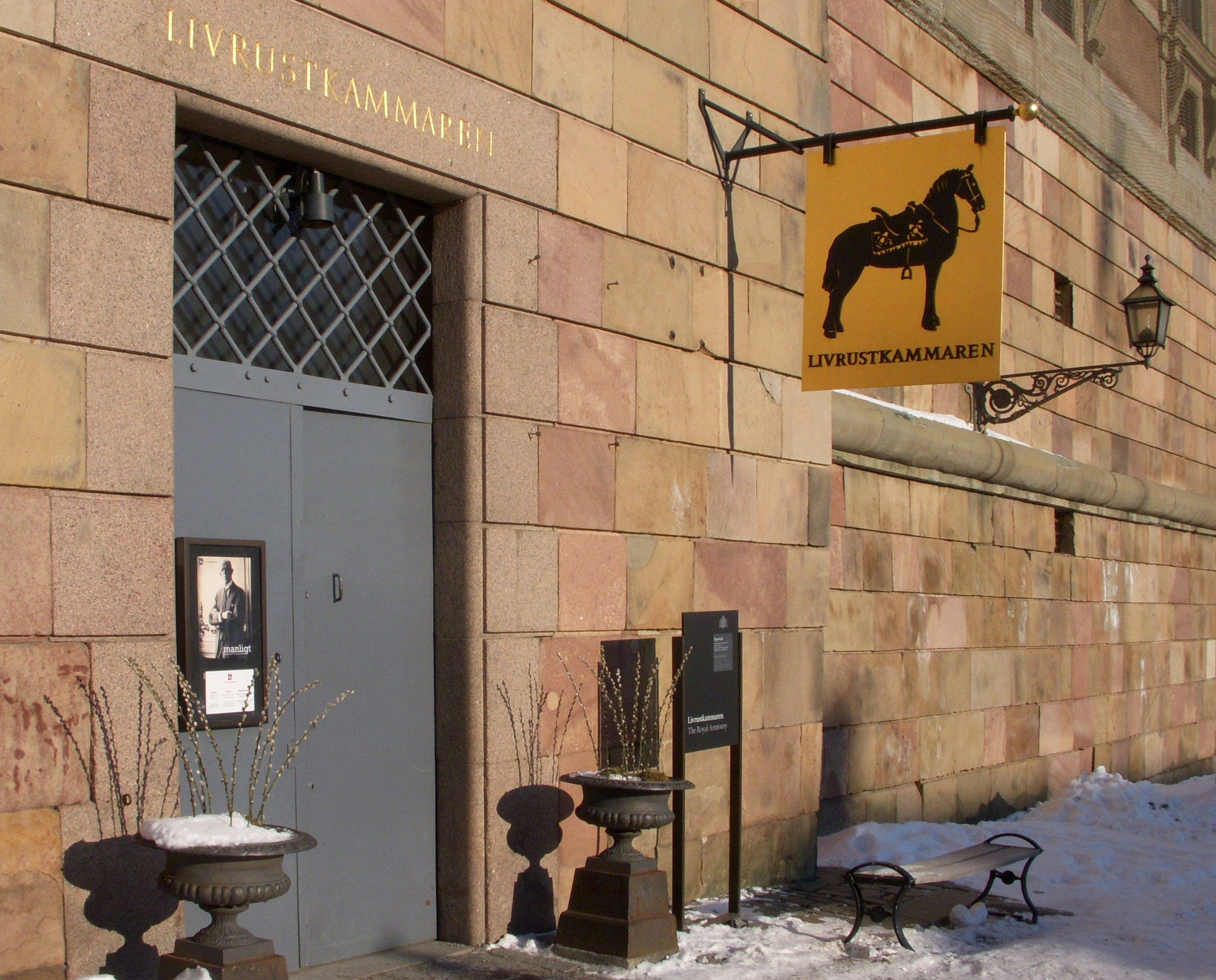 Stockholms slott, Livrustkammaren, entré